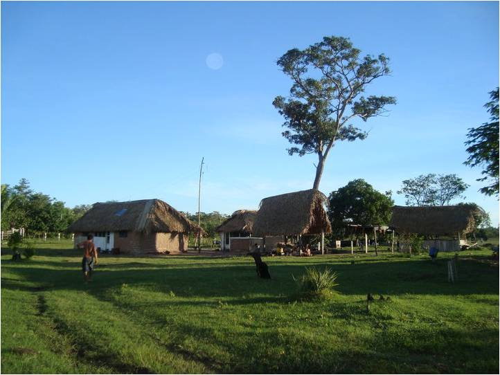 propiedad ganadera ambientalista ecologica tres lagunas